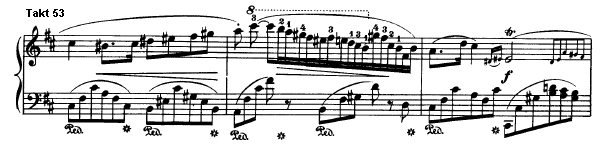 Takt 54 und 55 aus dem ersten Satz von Frederic Chopins Klaviersonate Nr. 3 in h-Moll